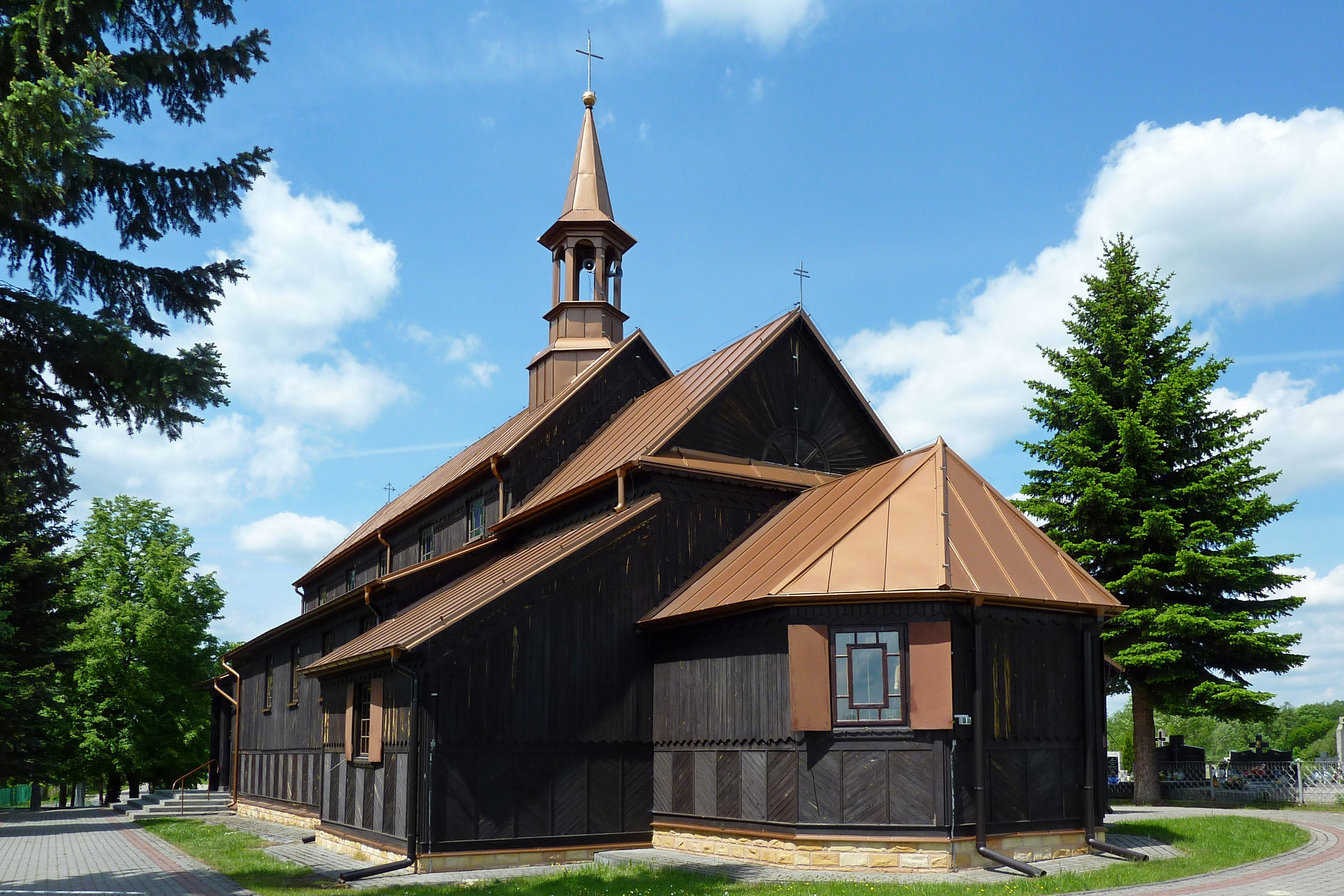 Kościół św. Aleksego w Oleksinie.